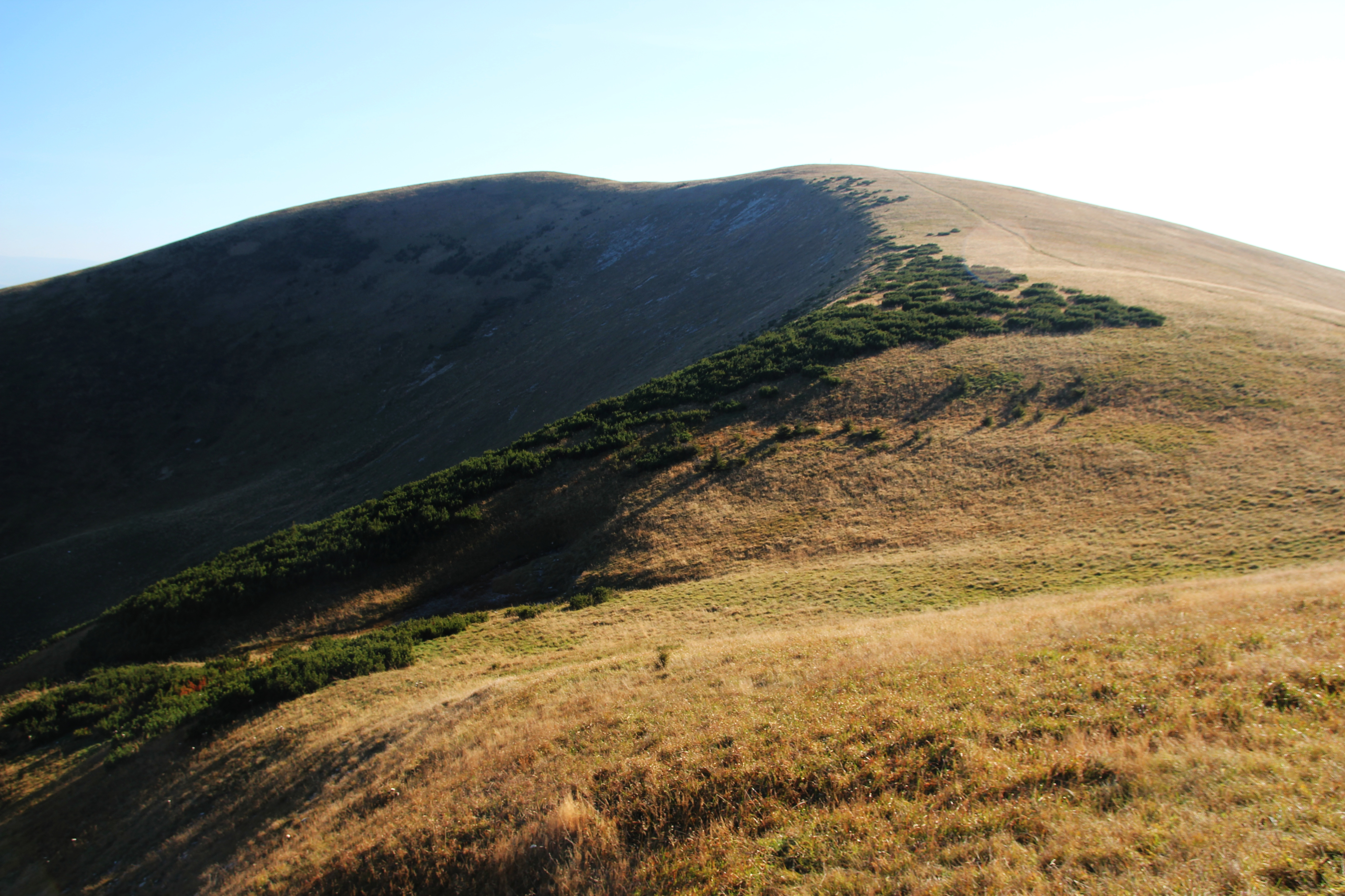 Frčkov